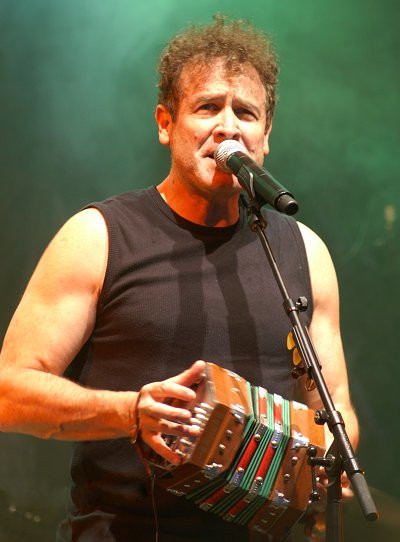 Johnny Clegg beim Open Air Konzert in Valenciennes (Frankreich)